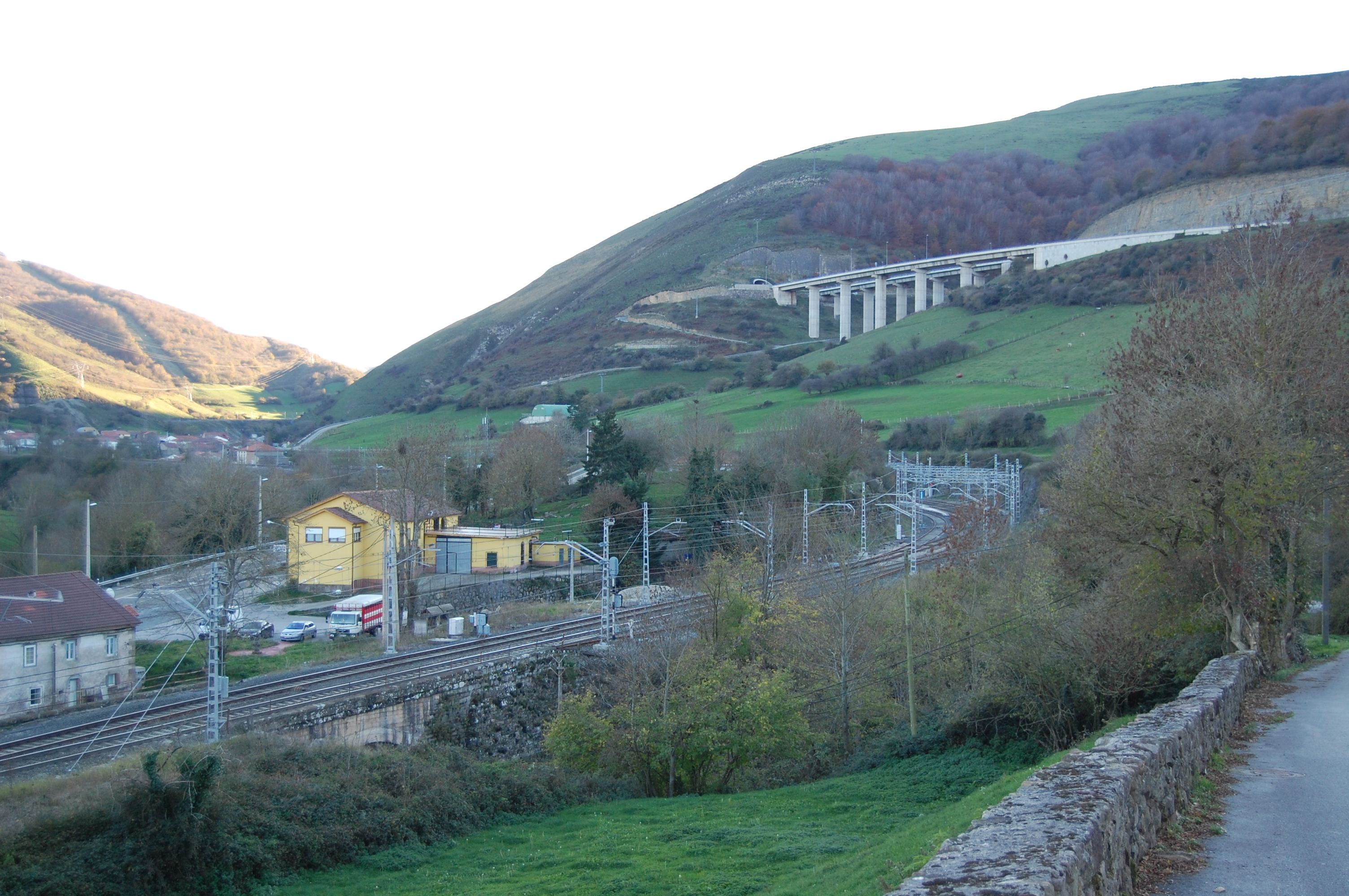 Santiurde de Reinosa, entre Santiurde y Lantueno